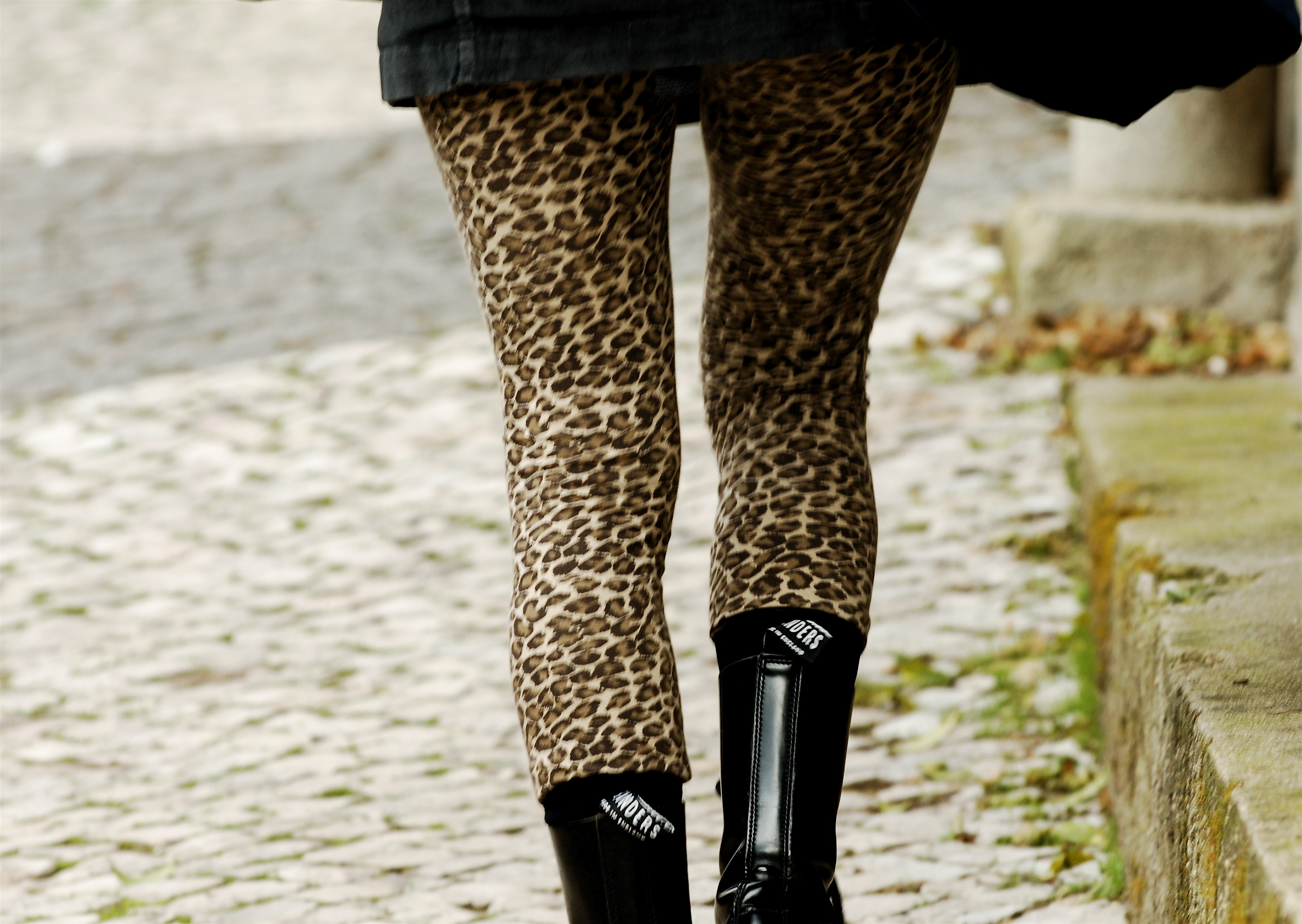 Lisbon, PortugalTiger legs